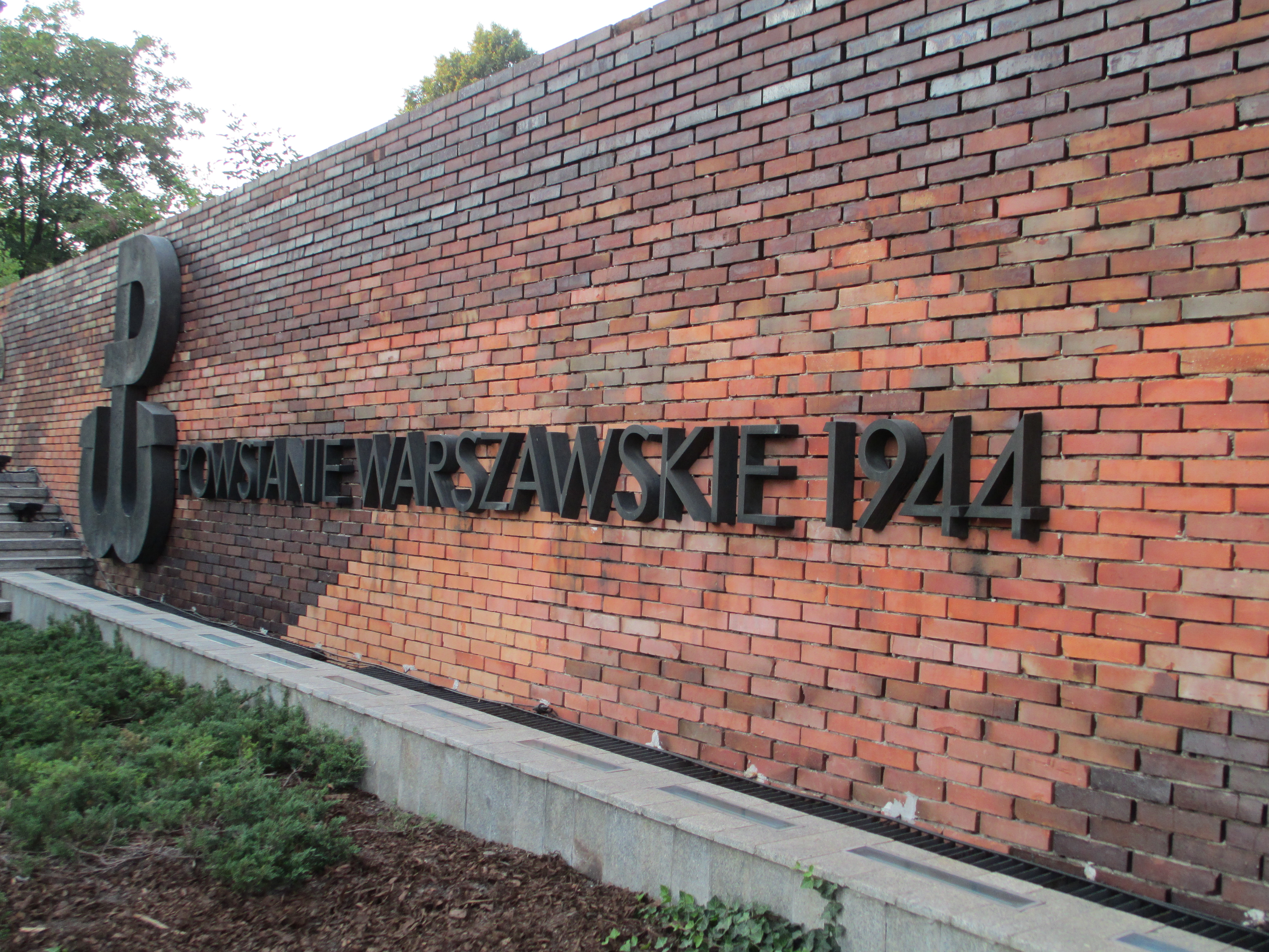 אתר זיכרון למרד הפולני בוורשה ב-1944